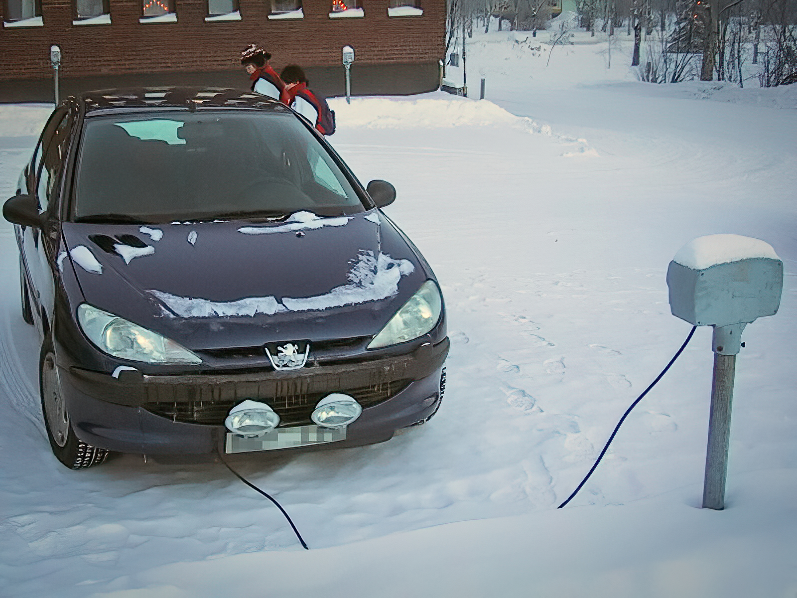 elektrische Standheizung an Peugeot 206 in Nordschweden